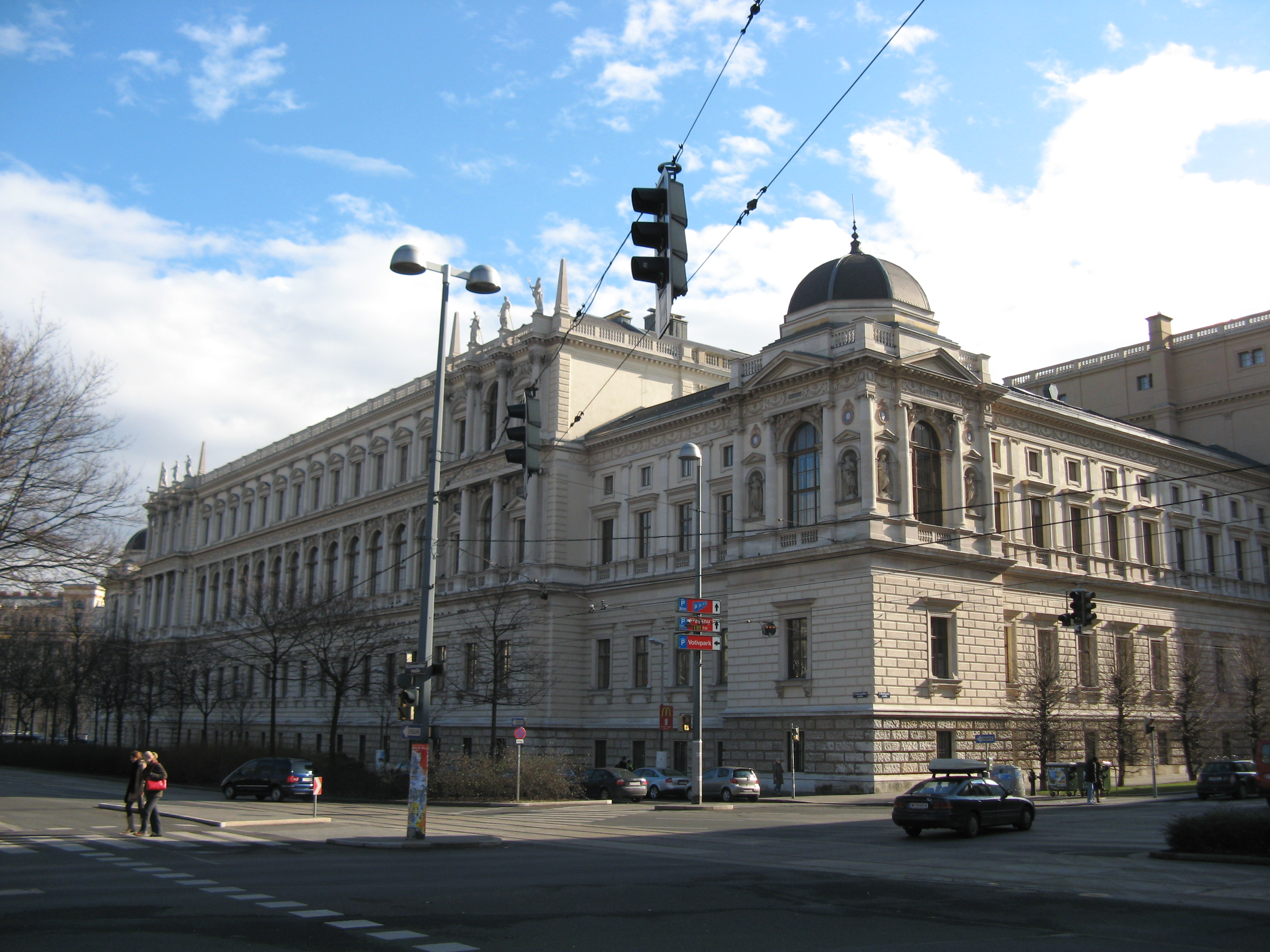 Universität Wien, Universitätsstraße 1, Wien-Innere Stadt